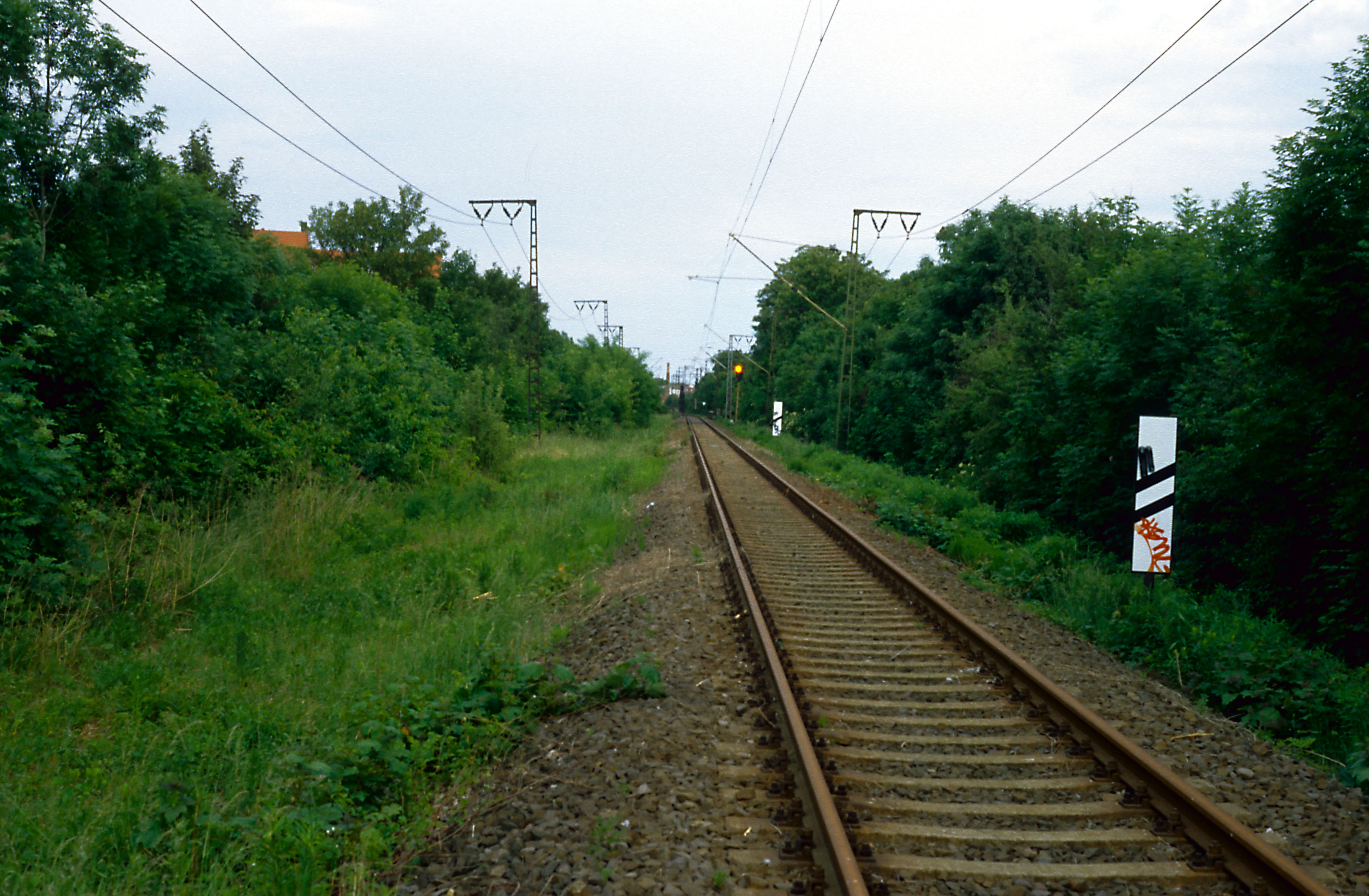 Vor dem Beginn der Bauarbeiten für die S-Bahn Leipzig–Halle. Seit 1946 ist die Strecke eingleisig, seit 1990 wird sie wegen der Schließung der Ortsgüteranlagen im Bf Leipzig MTh kaum mehr befahren. Die Fahrleitungsmasten wurden um 1960 gleich für zweigleisigen Betrieb aufgestellt. Zusätzlich tragen sie die Speiseleitungen vom Unterwerk Wahren zum Schaltposten Leipzig. Das Vorsignal ist das Einfahrvorsignal vom Bahnhof Leipzig MTh.